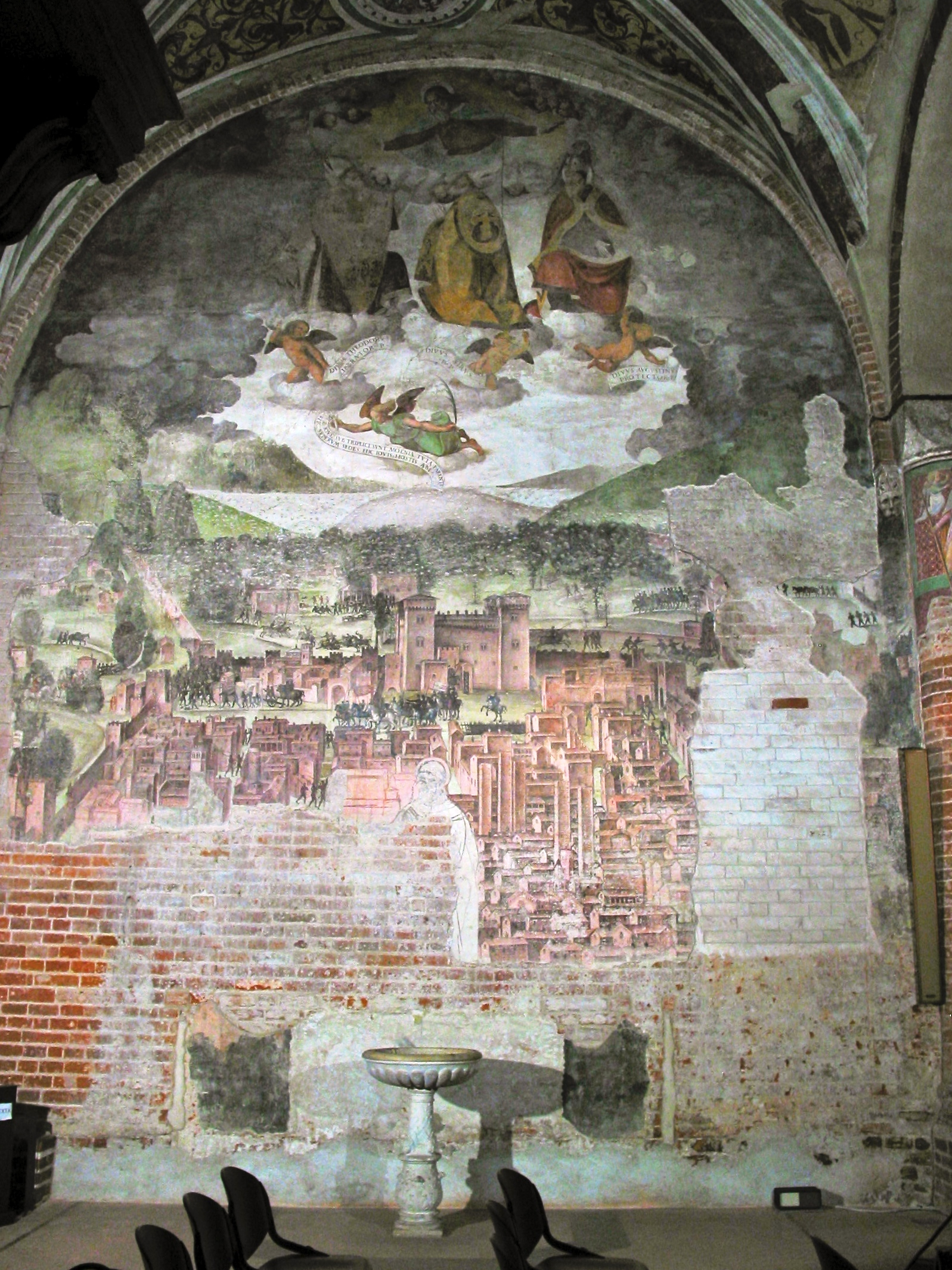 Affresco Pavia San Teodoro